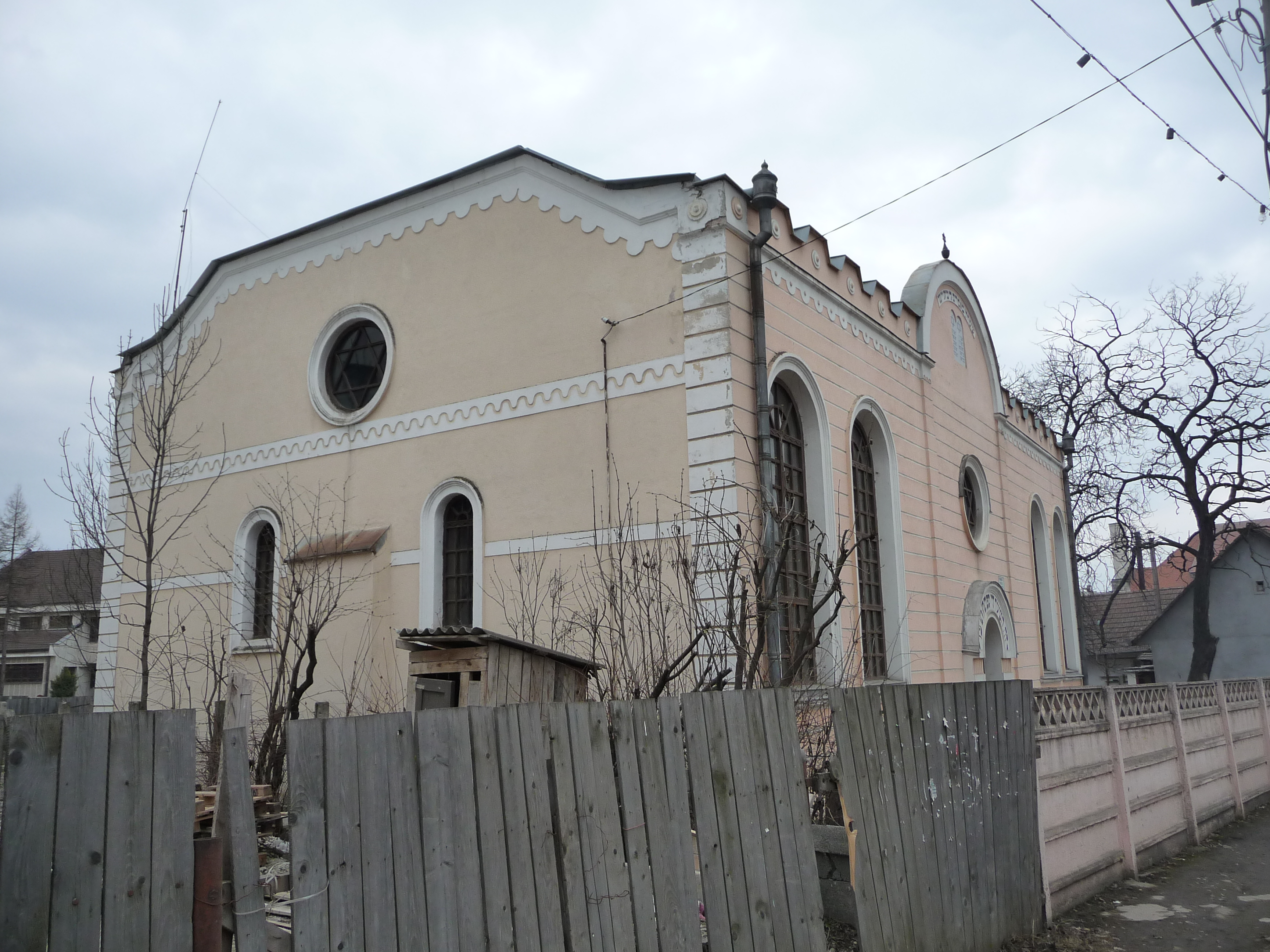 Zsinagóga Gyergyószentmiklóson, épült 1927-ben